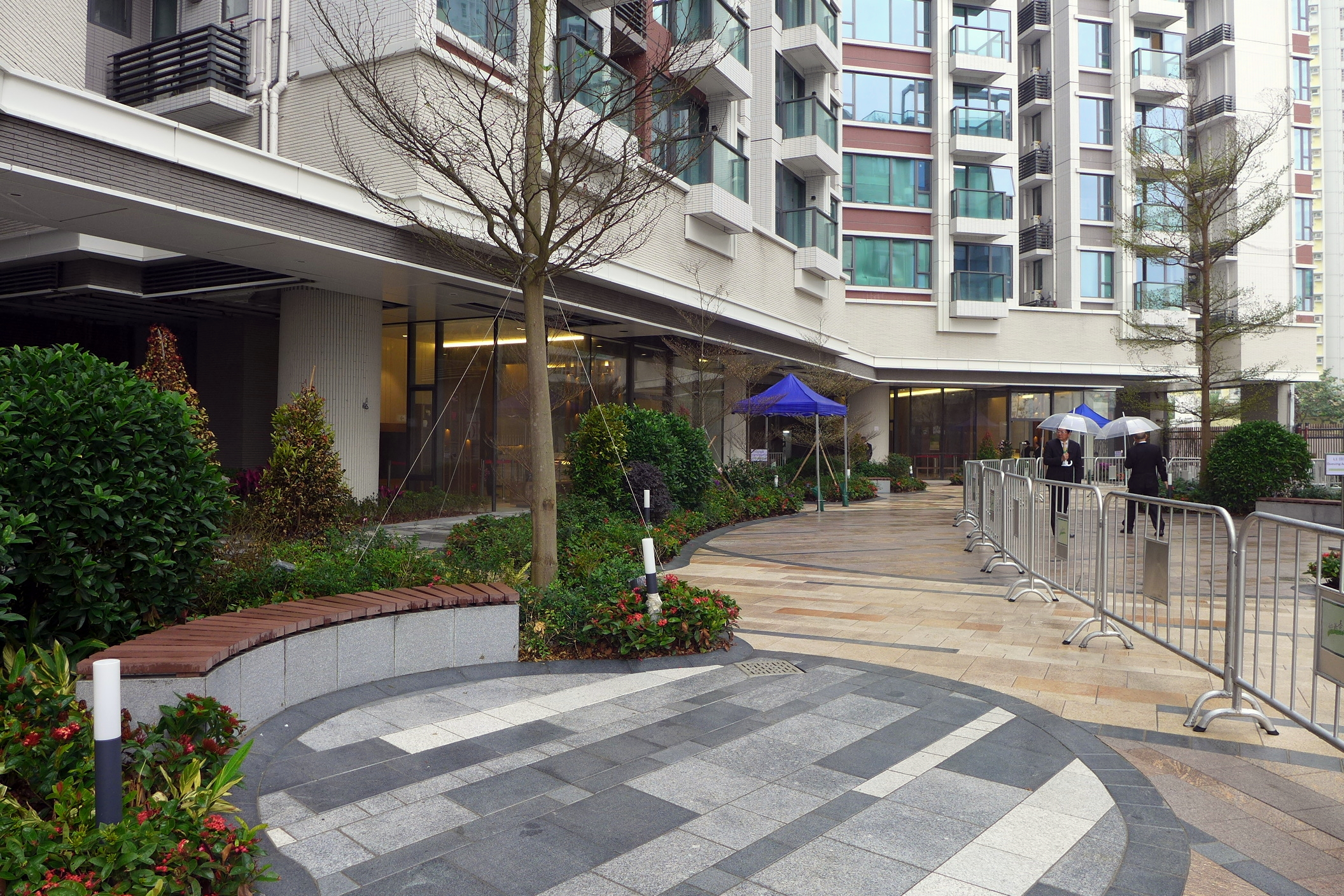 De Novo GF Garden